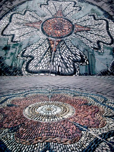 Rhosod cerigos, Rose Street, Caeredin, wedi eu seilio ar ddaeareg yr Alban.